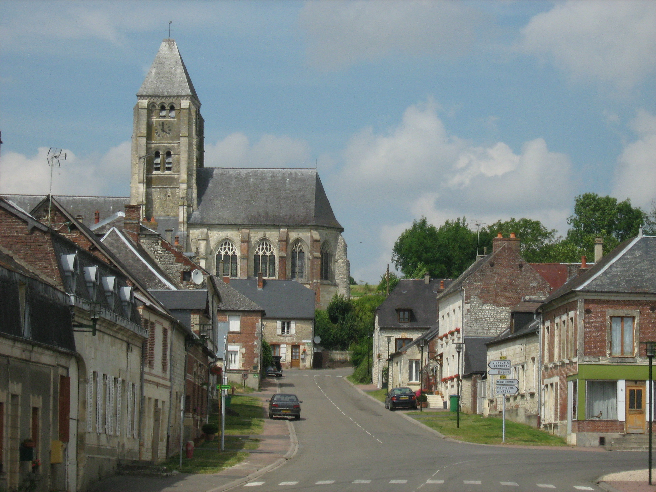 Eglise fortifiée dominant le bourg de Chaourse.